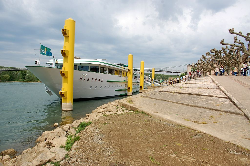 Das Fluss-Kreuzfahrtschiff Mistral in Montmerle-sur-Saône, France